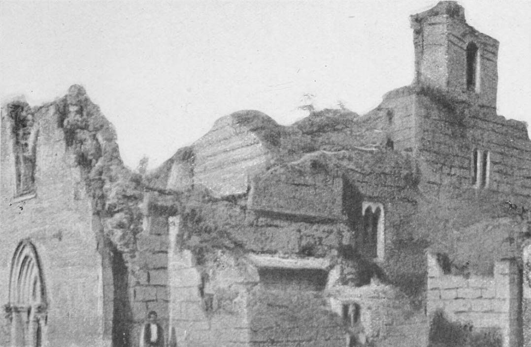 Ruines de l'église de Gradatz (d'apres Pokrychkin)